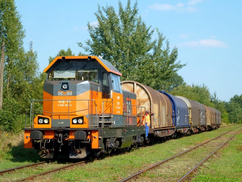 Zmodernizowany spalinowóz 6Dg-101 należący do Newagu i eksploatowany przez Lotos przejeżdża przez stację Kraków Prokocim Towarowy.